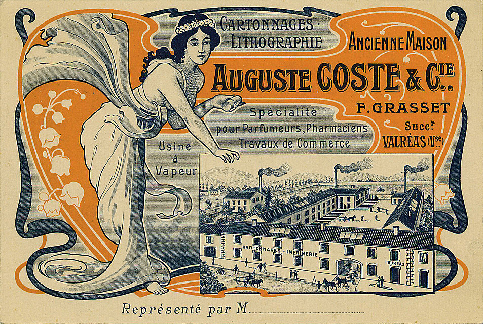 Publicité de cartonneur de Valréas au début du XXe siècle